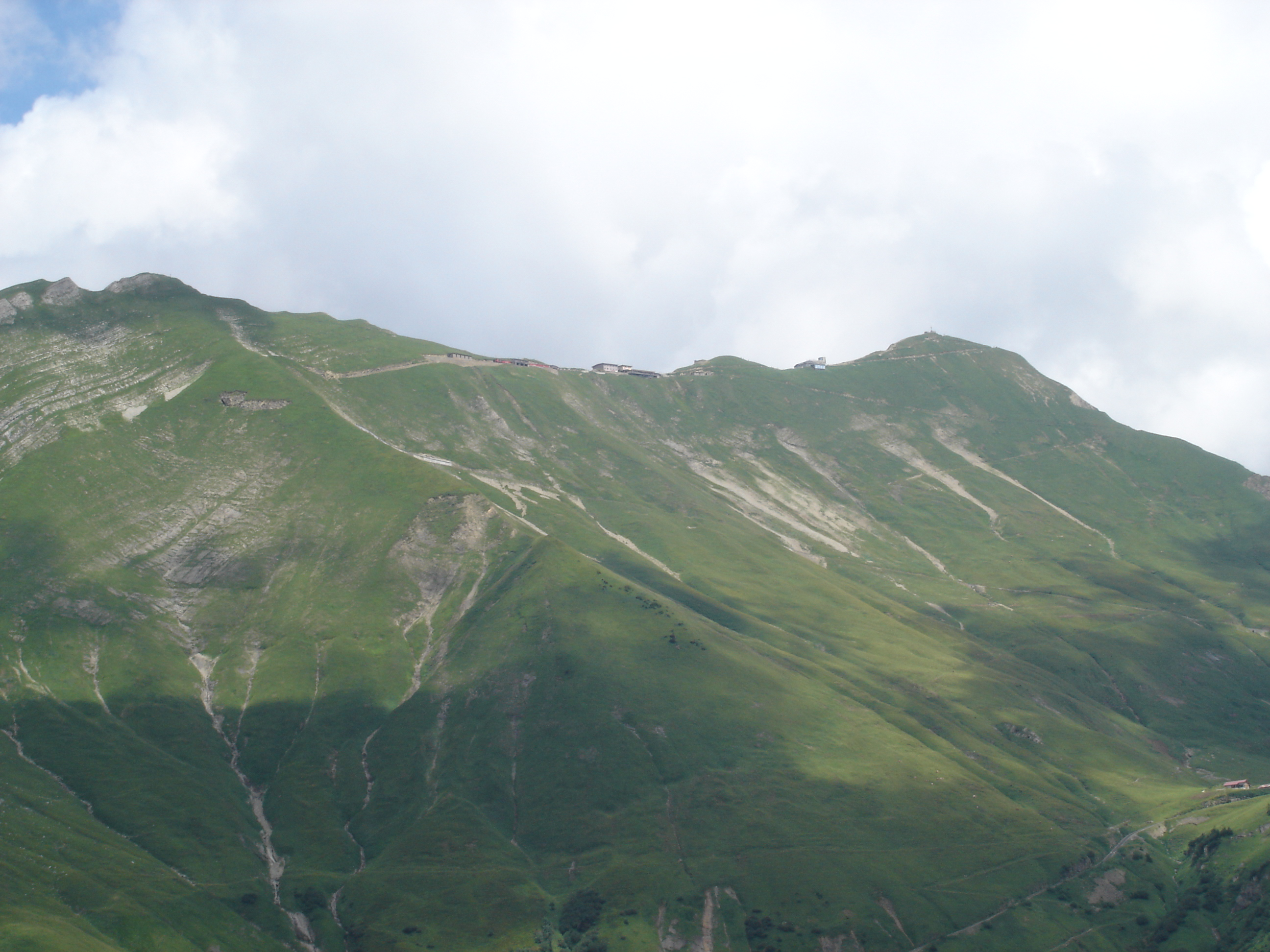 Brienzer Rothorn vom Tanngrindel aus fotografiert